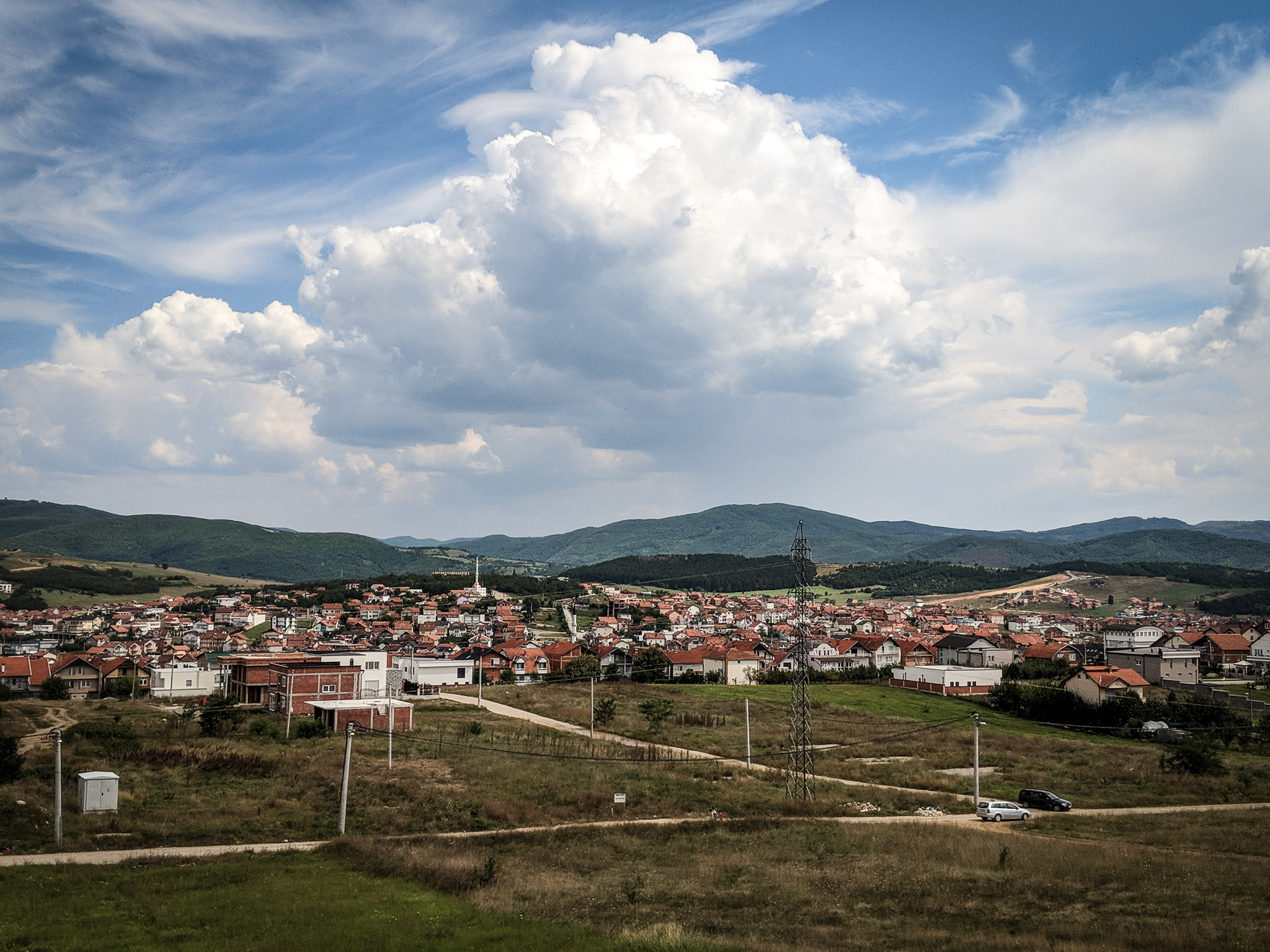 Qyteti i Gjilanit